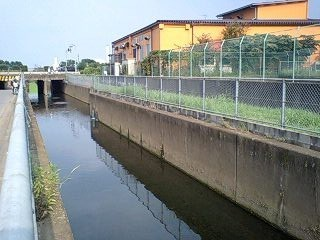 埼玉県ふじみ野市福岡新田・福岡江川